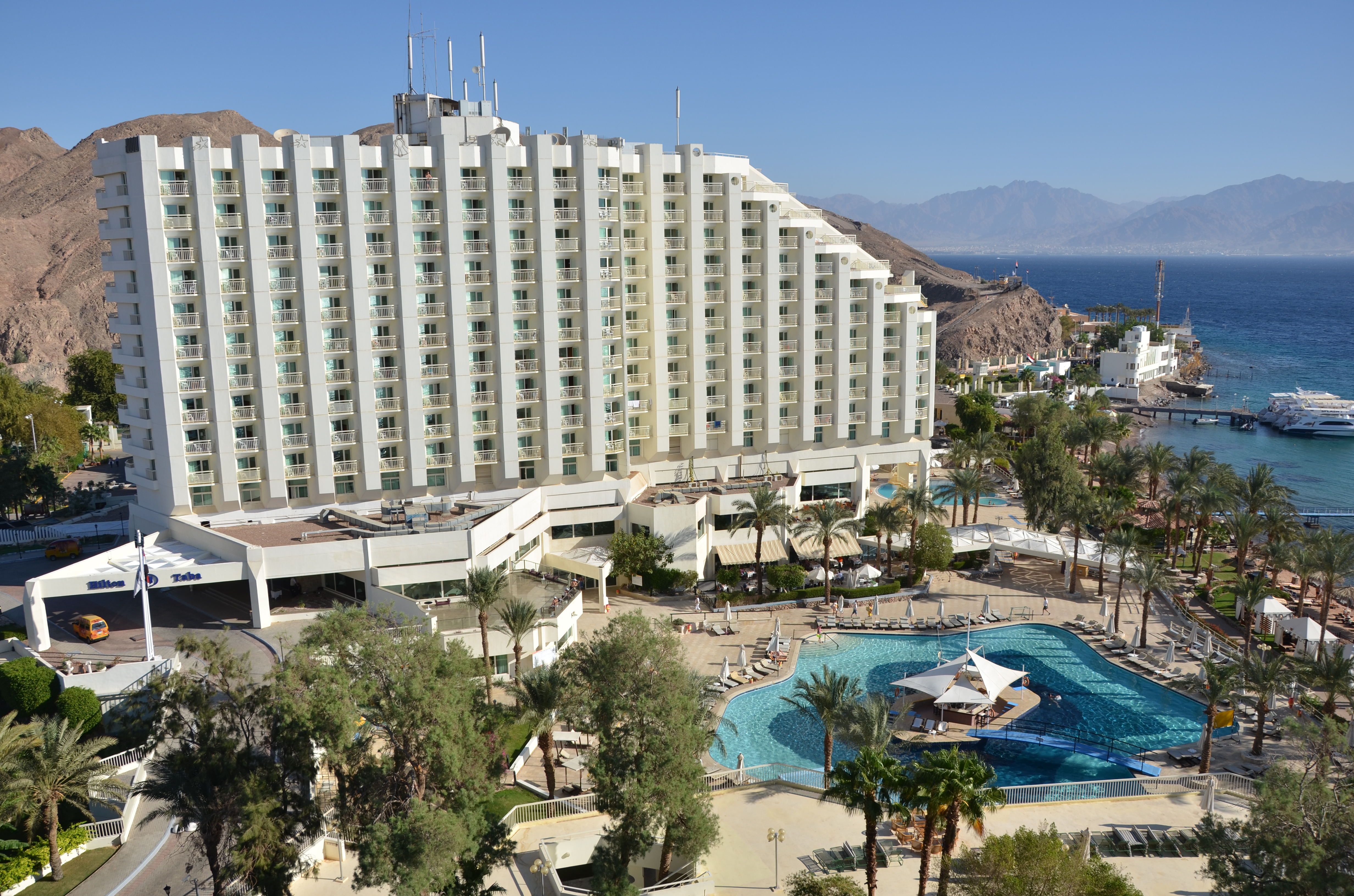 Hotel Hilton - Taba